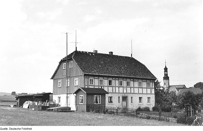 Original image description from the Deutsche Fotothek Mittelherwigsdorf-Oberseifersdorf. Haus des Koitsche Richter (Nr. 131), soll ehem. zusammen mit einer Windmühle auf der Koitsche gestanden haben